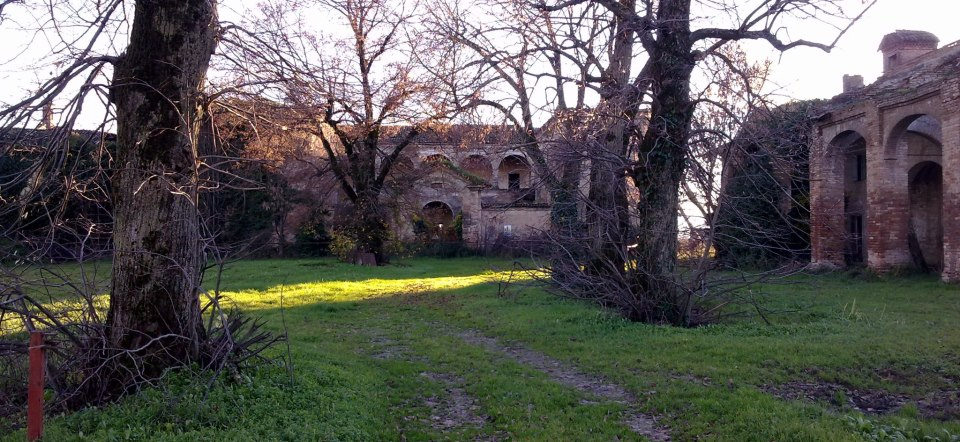 Villa Visconti nel 2012, la villa oggi è abbandonata.